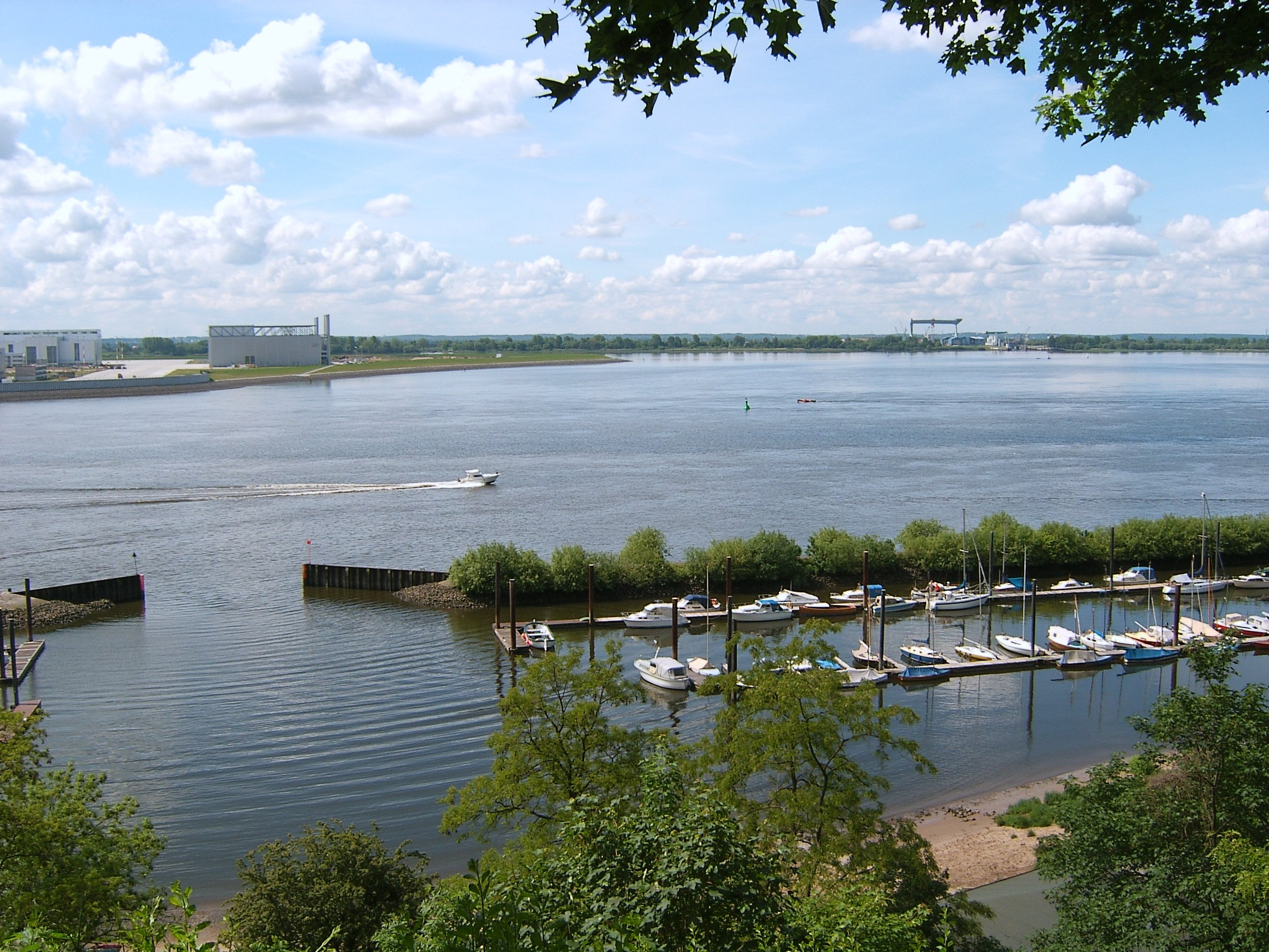 Bildbeschreibung: Hamburg, Stadtteil Blankenese, Yachthafen am Mühlenberg. Die Elbe, Mühlenberger Loch; links im Hintergrund der aufgeschüttete "Mühlenberger Sand". Ganz hinten ist die Sietas-Werft mit der Klappbrücke über das Este Sperrwerk zusehen. 2,5 km (Breite der Elbe). Die Aufnahme entstand bei Hochwasser; d. h. kein flachgefallenes Watt zu sehen! Eine typische Sommer-Aufnahme; denn die Boote liegen nur von April bis September im Hafen und werden mit den einsetzenden Herbststürmen an Land verholt. Genauso wie die Pontons selber. Die grüne Tonne in der Bildmitte markiert die gegenüberliegende Seite der Fahrrinne der Elbe, die einen gleichmäßigen Tiefgang von 12 Metern (NN) gewährleistet. Die Schiffe fahren also dicht hier vorne vorbei, während der hintere Teil teilweise Naturschutzgebiet ist. Fotograf: selbst Datum: 2. Juni 2006